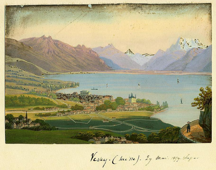 Vevey, peinture sur mica